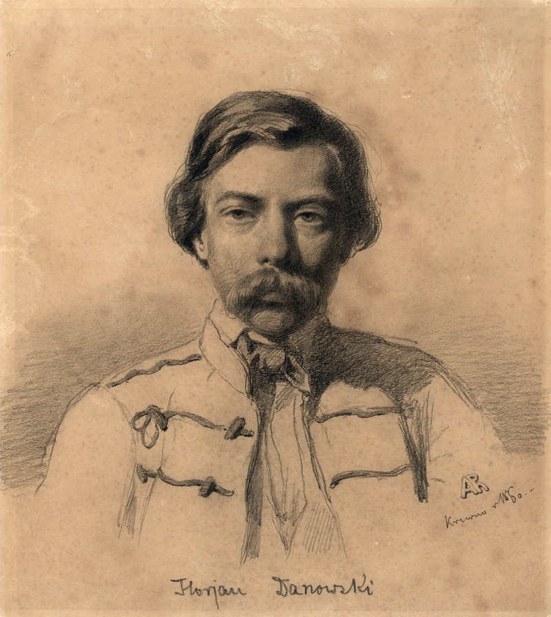 Riomeris, Alfredas Izidorius. Sukilėlis ir tremtinys Florijonas Danauskas. 1860, popierius, pieštukas.